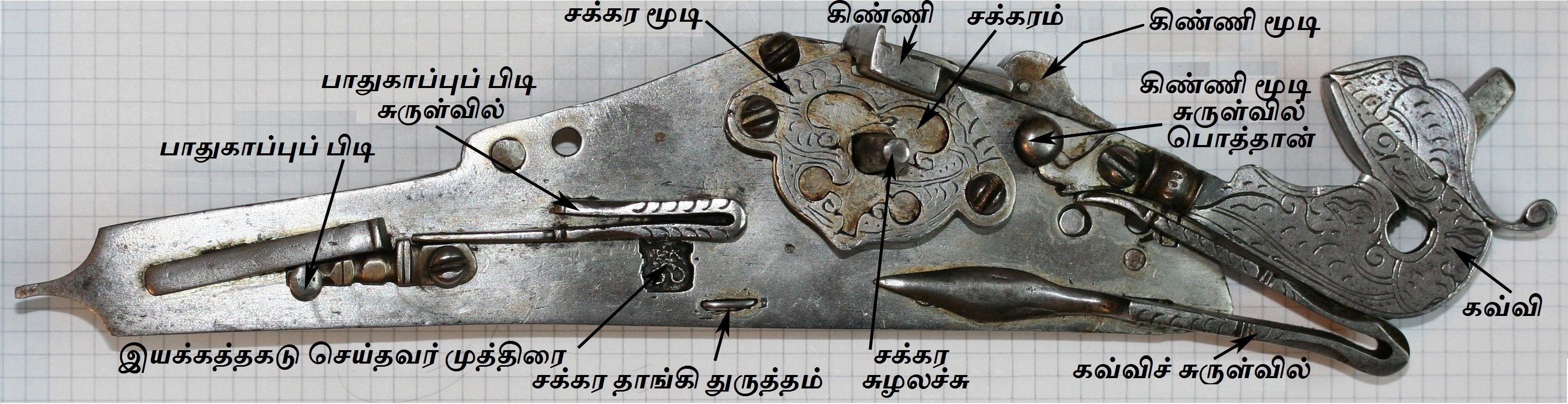 சக்கர இயக்கத் துப்பாக்கியின் இயக்கம். மூடிய நிலையில்